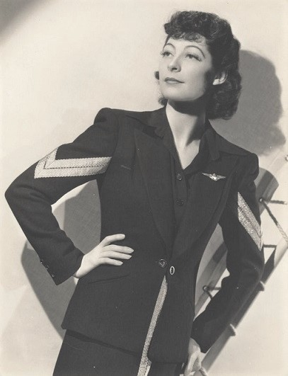 Ilka Chase